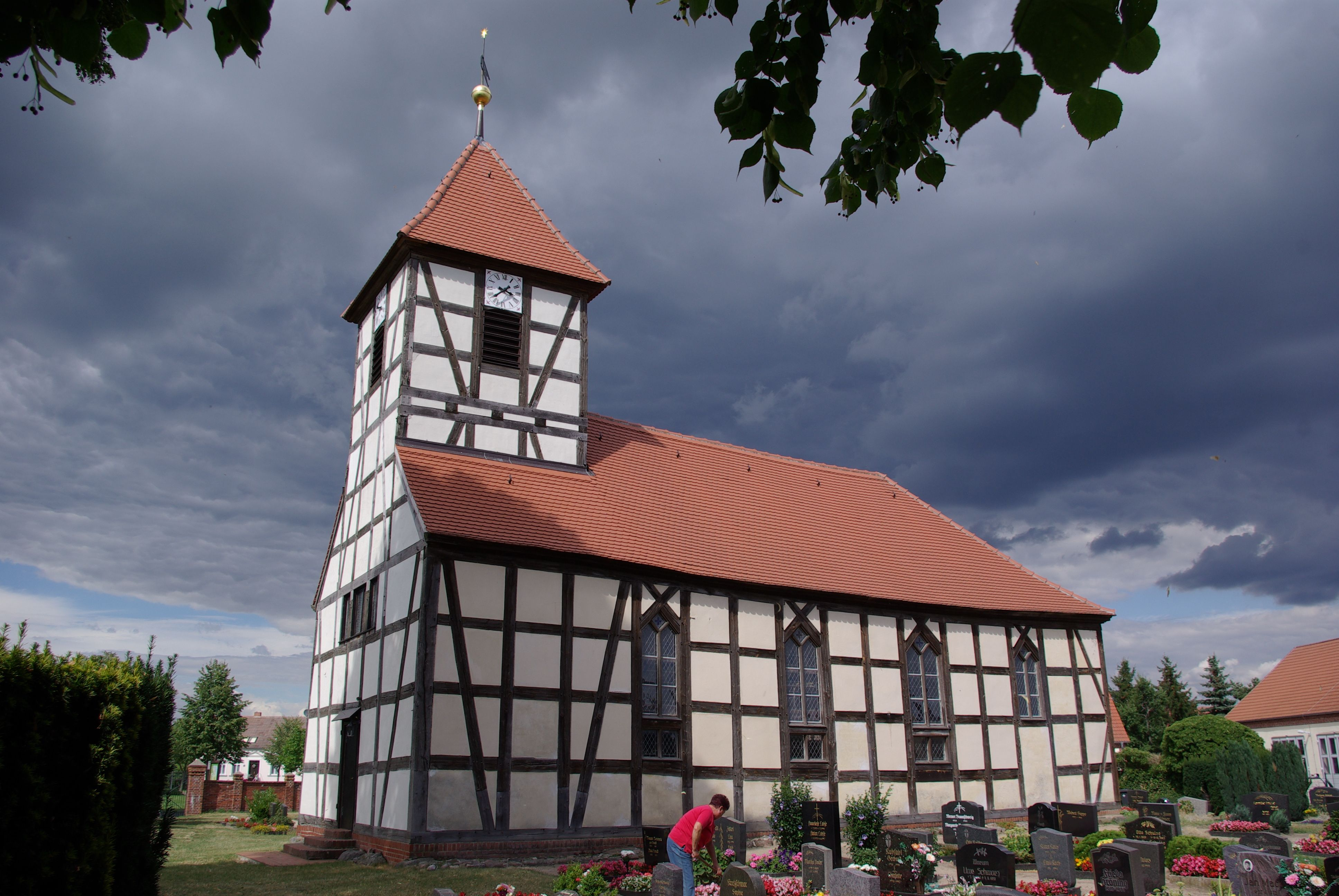 Rathenow Ortsteil Semlin in Brandenburg. Die Kirch im Ortsteil Semlin steht unter Denkmalschutz.